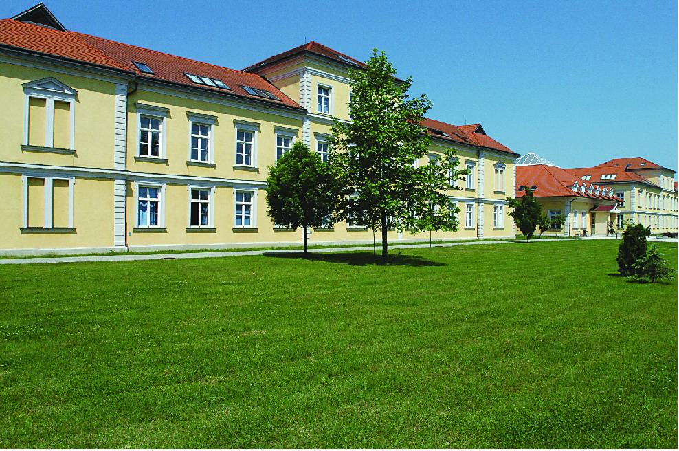 A Debreceni Egyetem Közgazdaságtudományi Kar épülete